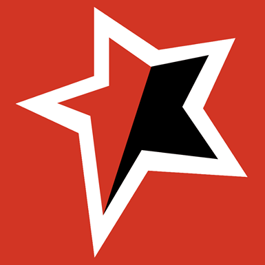 Símbolo de Izquierda Libertaria, movimiento político chileno.